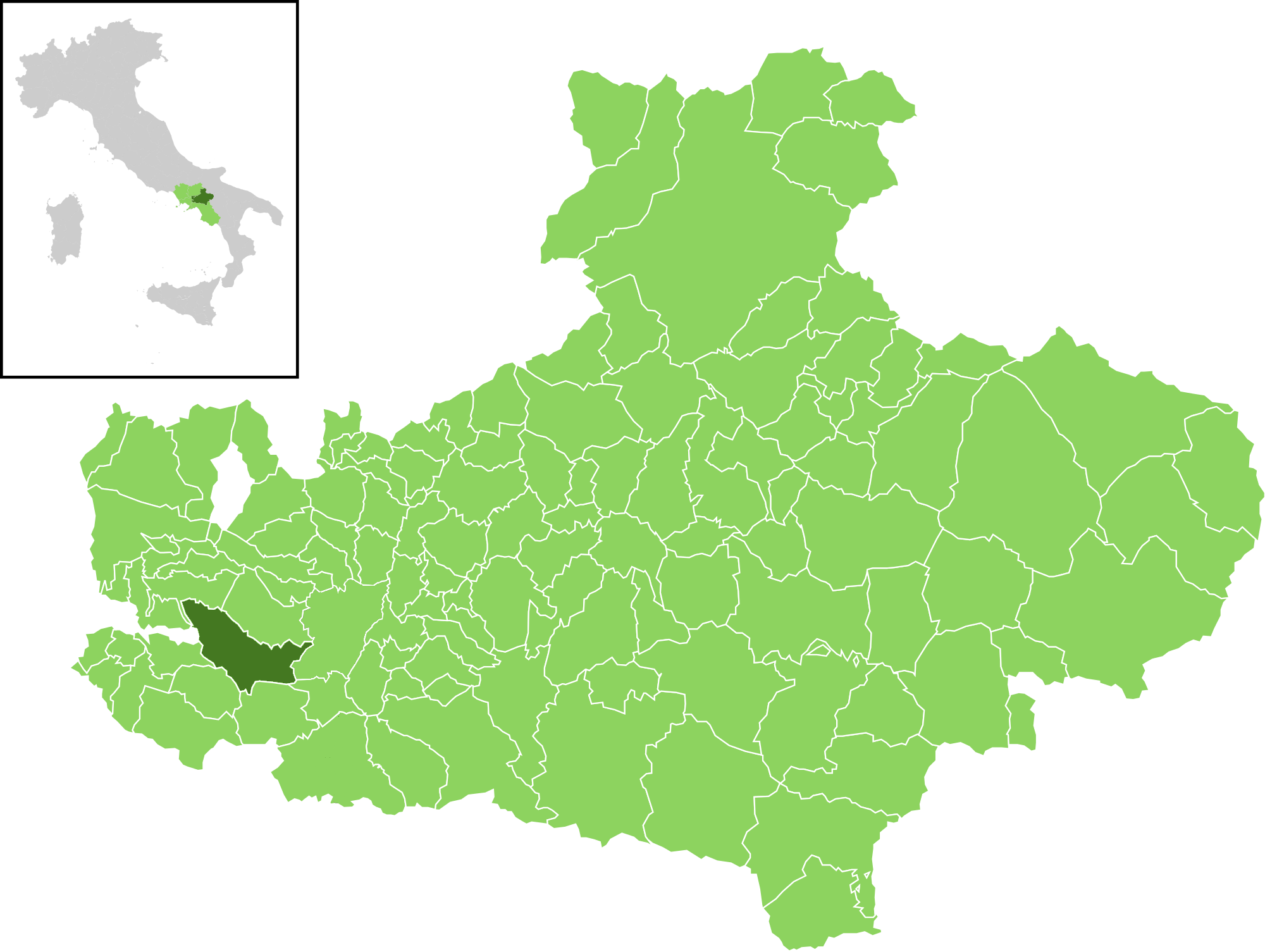 Posizione del comune all'interno della provincia di Avellino